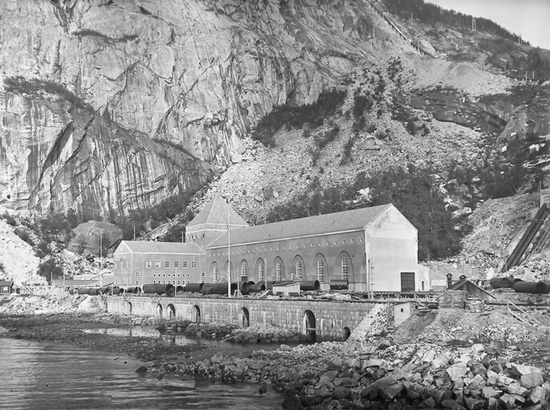 Fykan kraftstasjon i Glomfjord, Meløy kommune. Tatt fra sjøsiden fra lastekaia. Anleggsarbeidene foregår fremdeles. Dette objektet finnes i samlingene til Nordlandsmuseet.